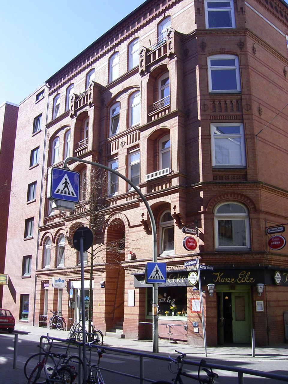 Das Haus Kohlhöfen 87 (heute Hausnummer 29) in der Hamburger Neustadt diente 1805/06 dem Kaufmann Heinrich Floris Schopenhauer und seiner Familie, zu der auch der damals 17-jährige Arthur Schopenhauer und die achtjährige Adele Schopenhauer gehörten, zur Wohnung.